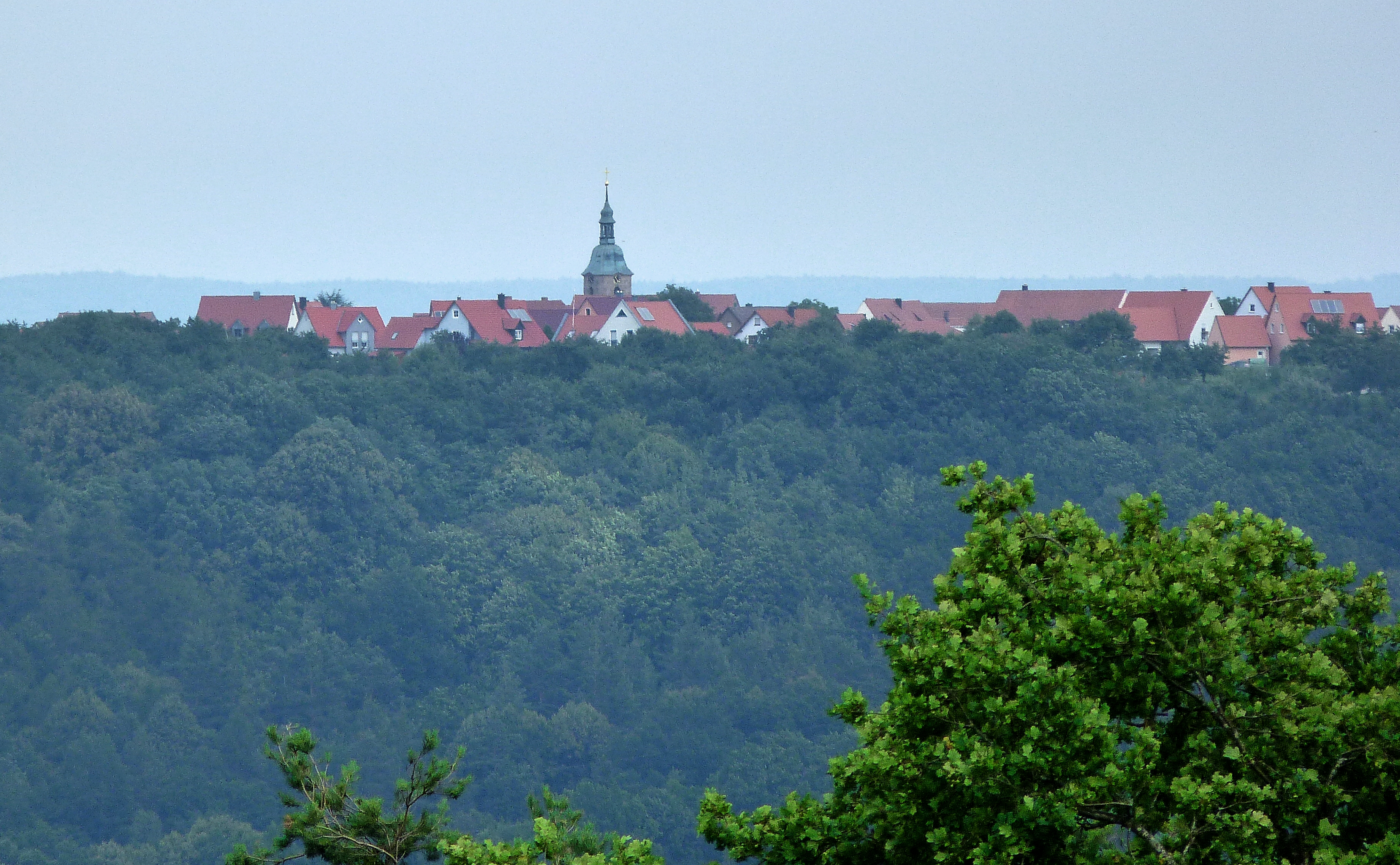 von Schnittling aus gesehen.